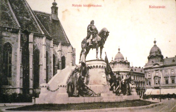 CLUJ - STATUIA LUI MATEI CORVIN - INCEPUT DE 1900